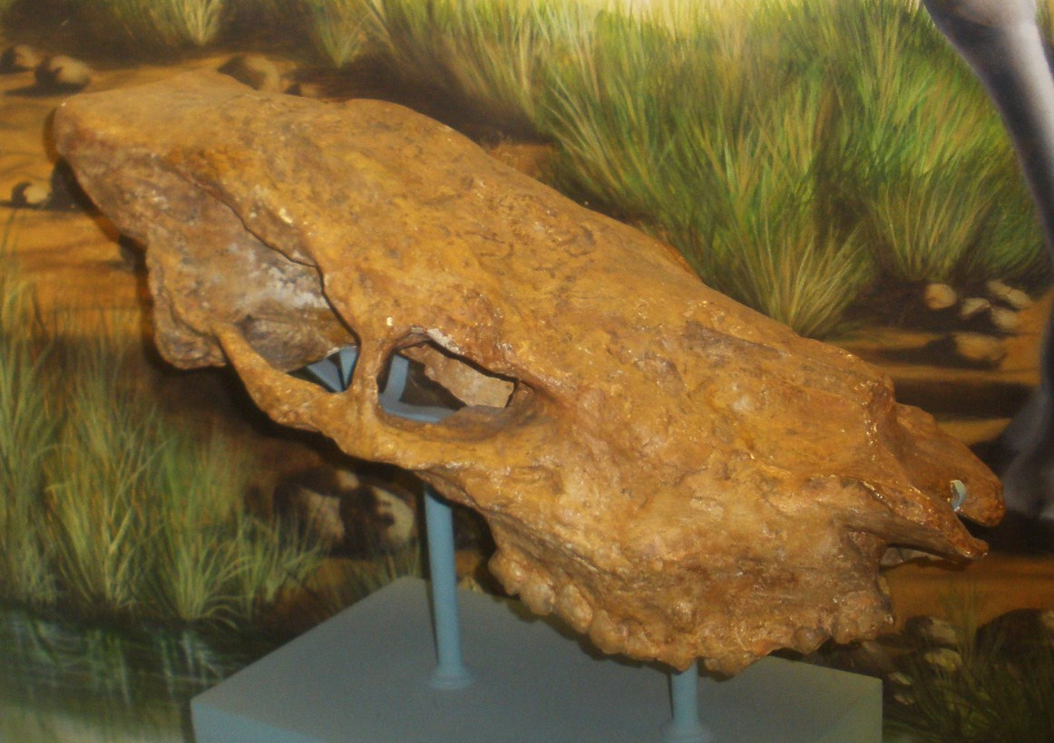 Fossil of Helladotherium, an extinct mammal- Took the picture at Museo di Paleontologia di Firenze